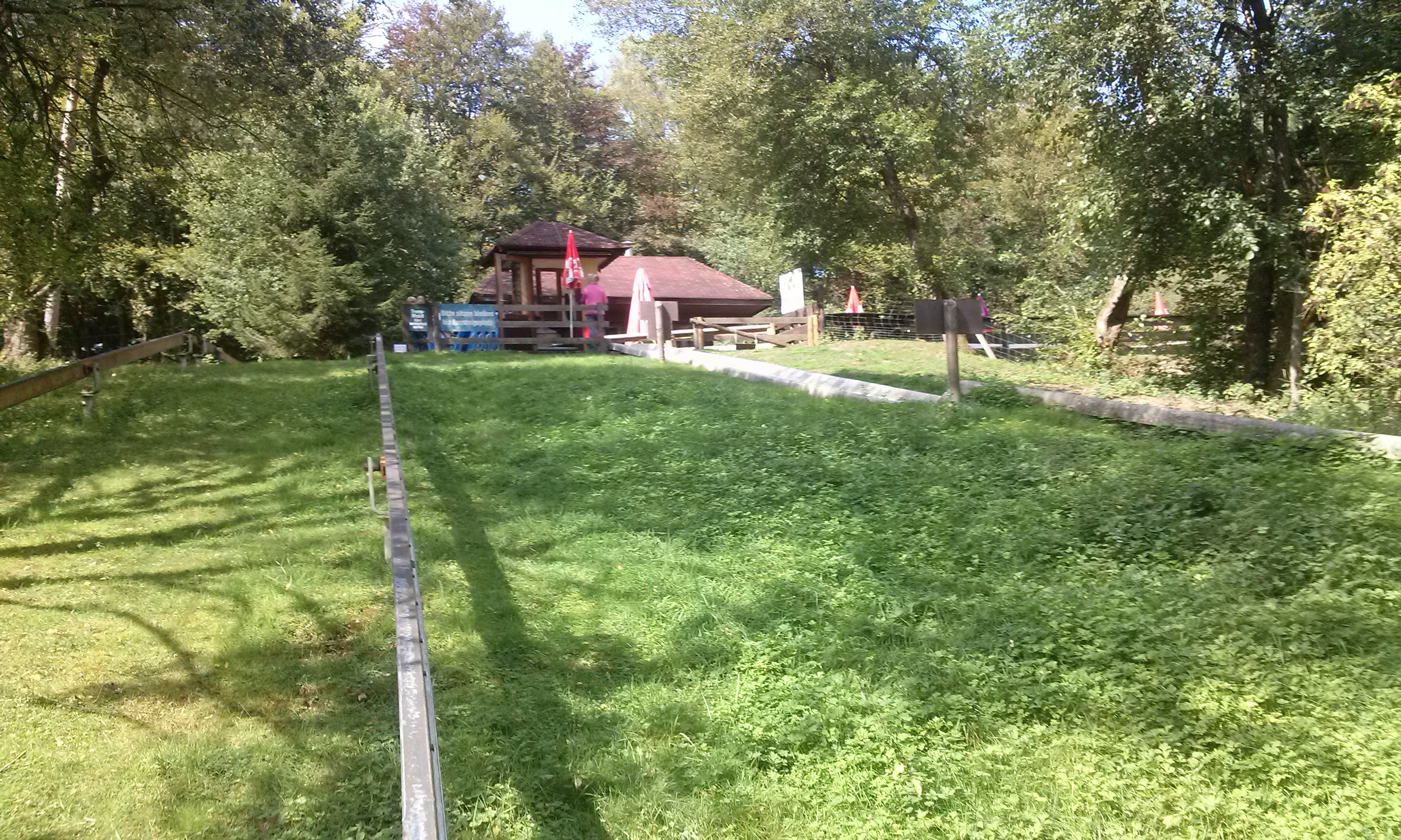 Bergstation der Rodelbahn; Transportschiene links; Sommerrodelbahn rechts